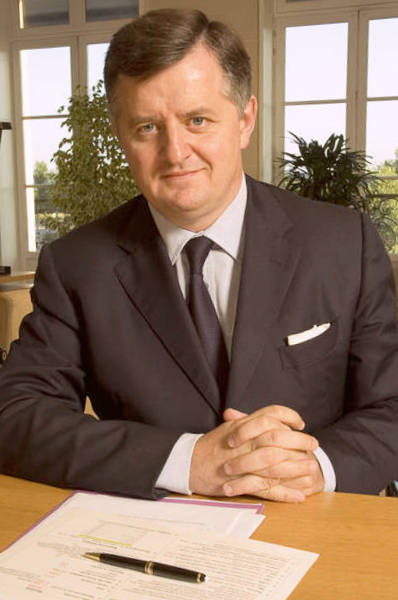 Portrait d'Augustin de Romanet